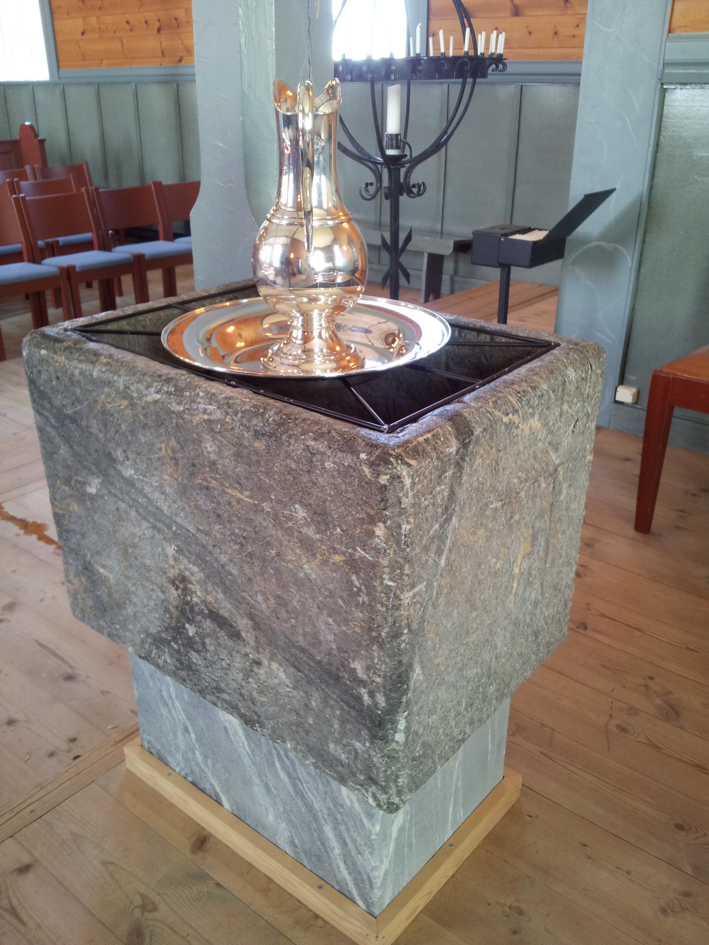 Døypefonten i Austrheim kyrkje / Baptismal font in Austrheim church, Norway